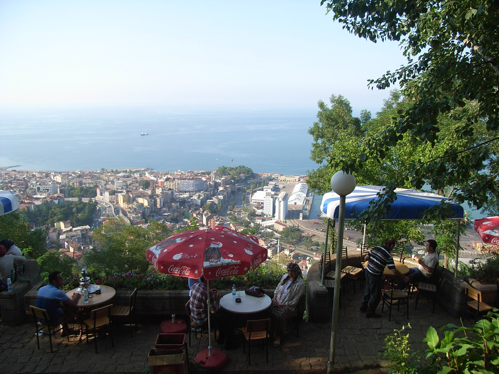 Trabzondan bir manzara, View of Trabzon